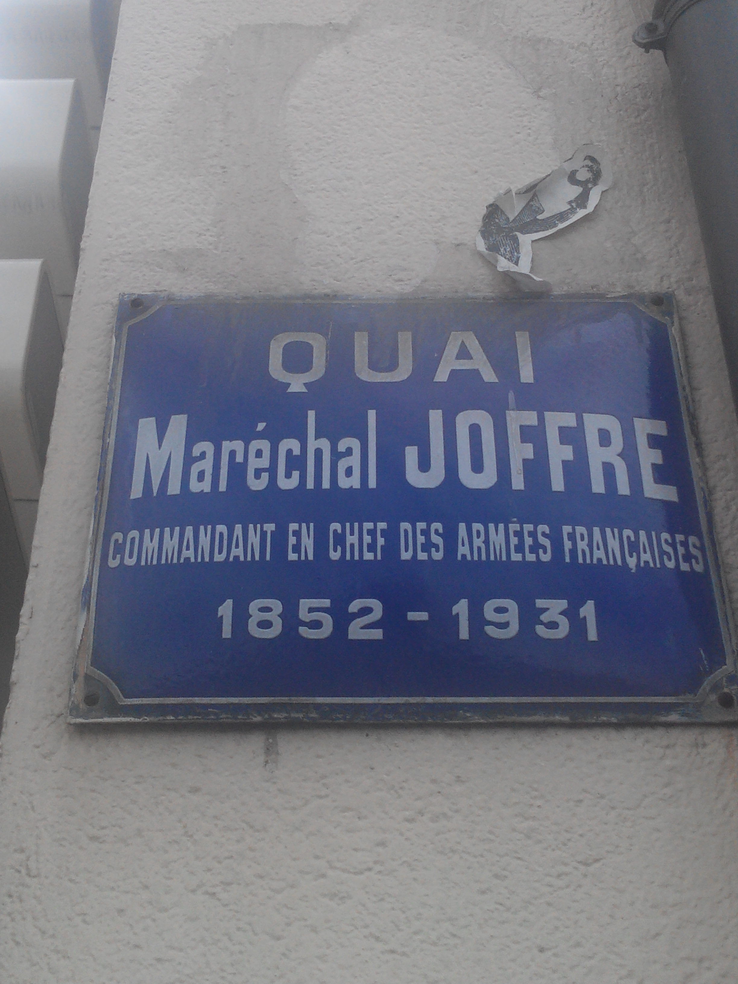 Plaque du quai Maréchal Joffre, dans le 2e arrondissement de Lyon, au coin de la place Gensoul.